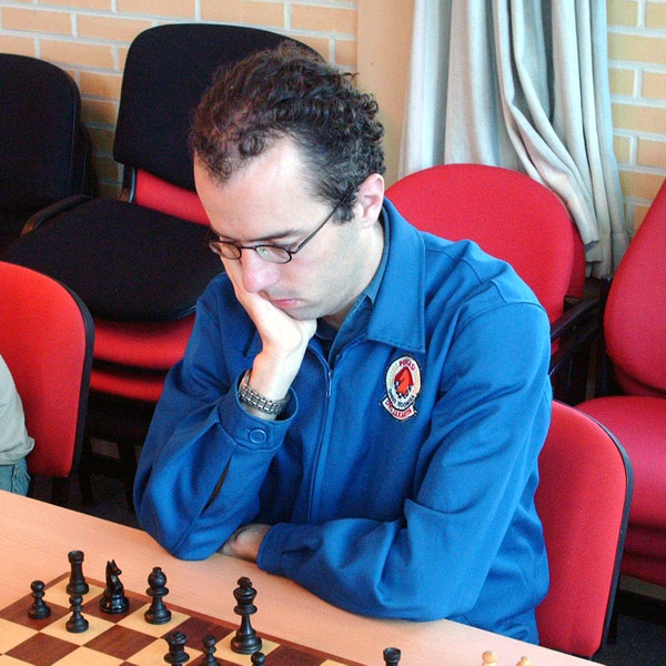 GM Erik van den Doel, Voorschoten 2007